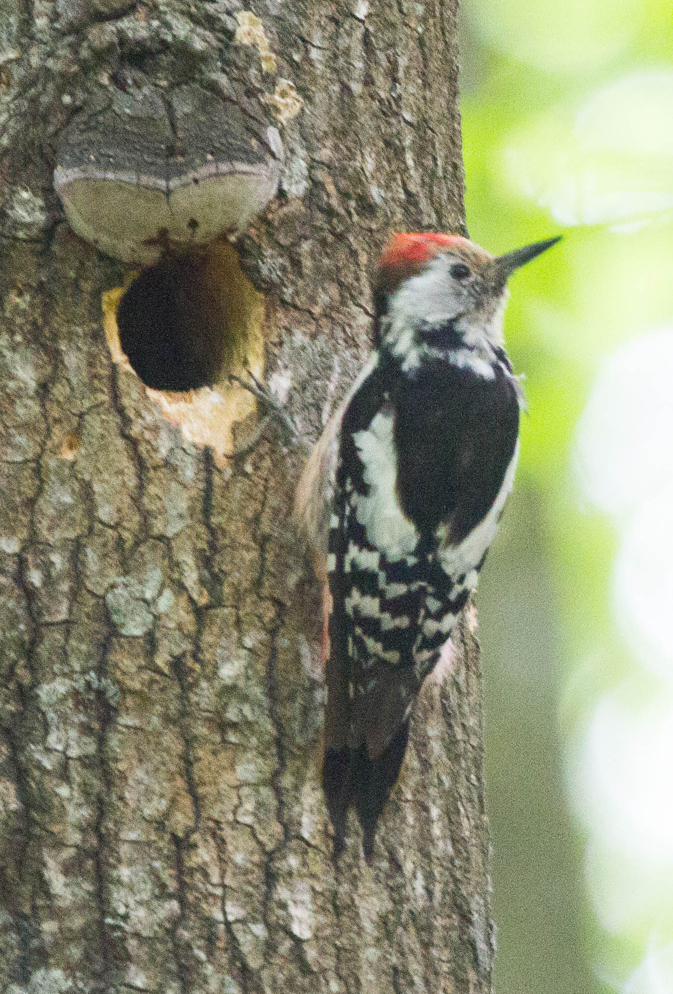 Middle-spotted Woodpecker (Dendrocopos medius)